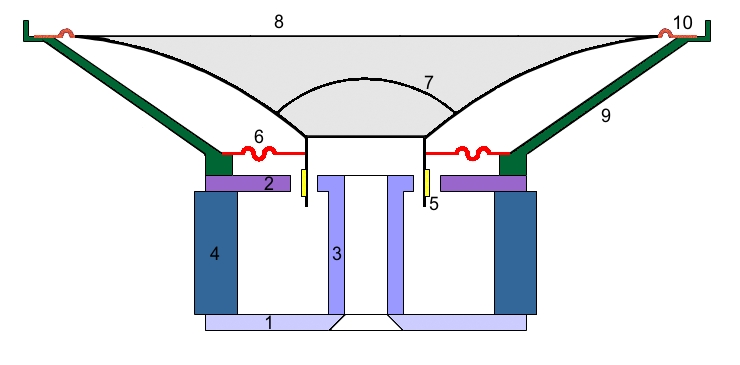 loudspeaker